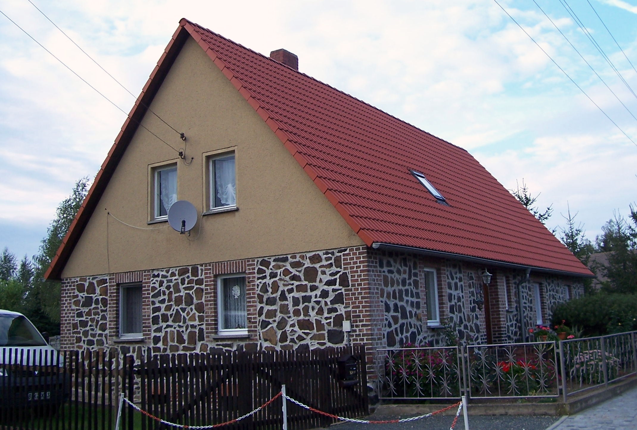 Feldsteinhaus in der Gemeinde Elstertrebnitz